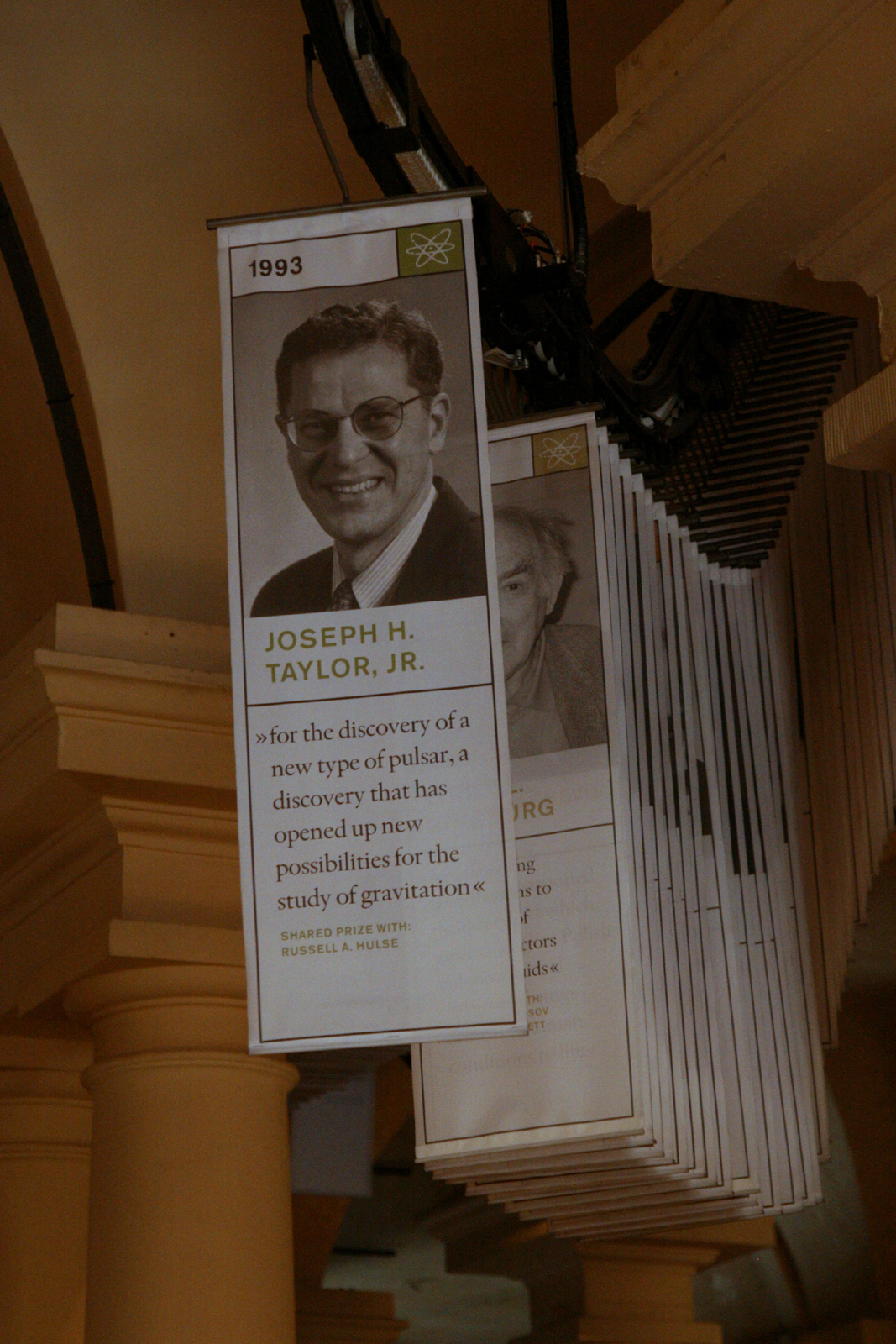 Interieur Musée Nobel à Stockholm